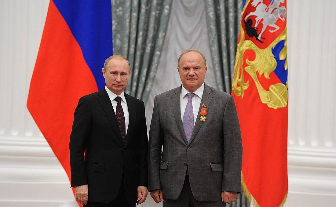 Орденом Александра Невского награждён депутат Государственной Думы Геннадий Зюганов